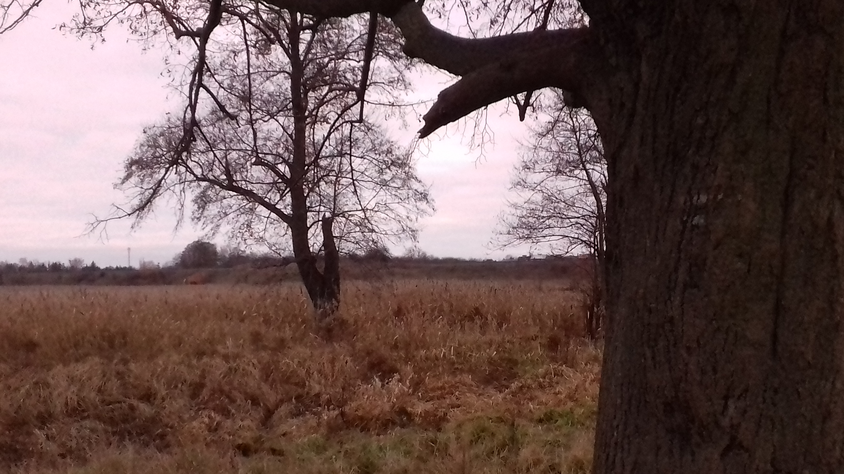 Pańska Górka w Stęszewie - widok ze szlaku pieszego nr 3583